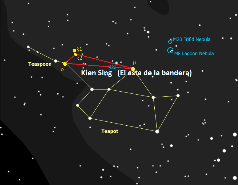 Kieng sing. El asta de la bandera